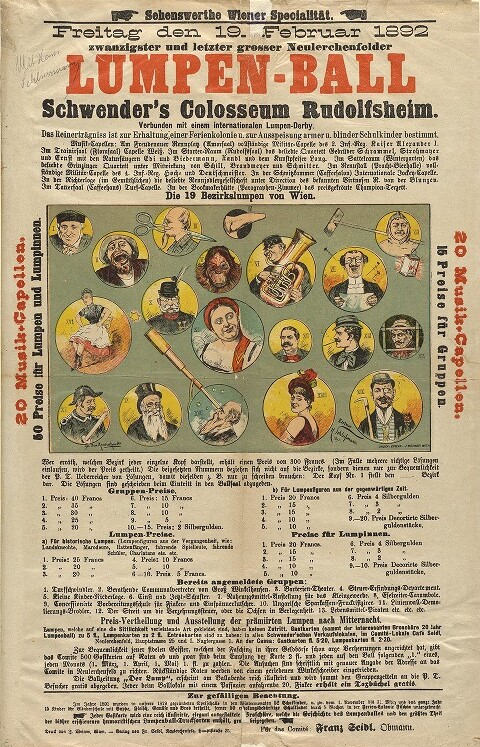 Plakat für den "Lumpen-Ball" in "Schwender's Colosseum Rudolfsheim" ("zwanzigster und letzter großer Neulerchenfelder") am 19. Februar 1892 "verbunden mit einem internationalen Lumpen-Derby". Mit einer Zeichnung: "Die 19 Bezirkslumpen von Wien". Wenn man sie richtig zuordnen konnte, dann bekam man einen Preis.